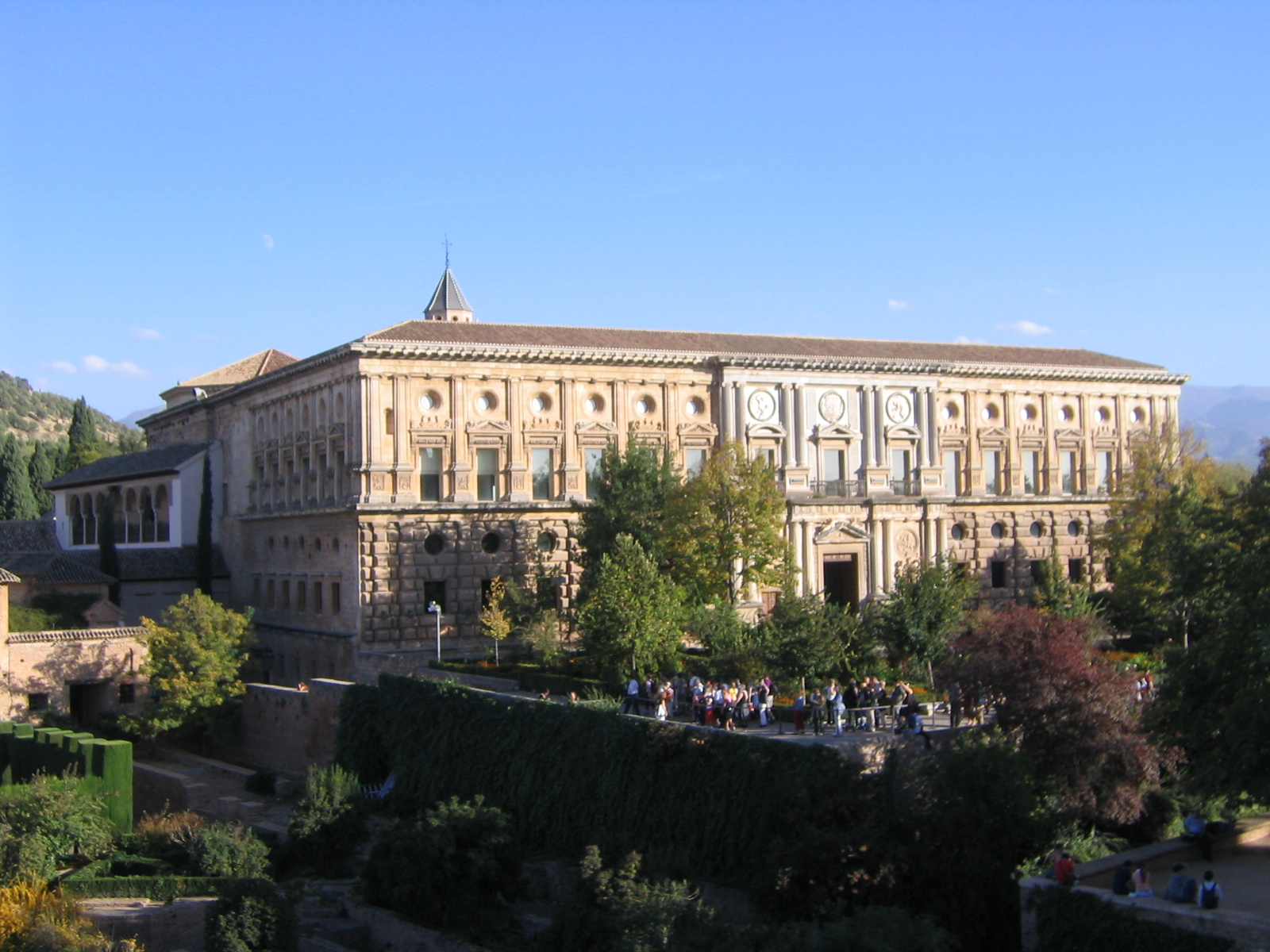 Palacio de Carlos V, Alhambra, Granada, Spain; west facade